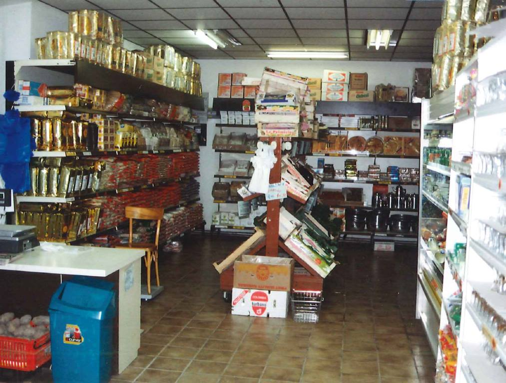 Erster ETSAN Supermarkt noch unter dem Namen Aksoy fungierend